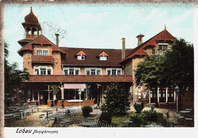 Honigbrunnen, Ansichtskarte von 1900